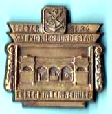 Abzeichen zum XXI. Bayerischen Pionier-Bundestag, Speyer 1934, mit Motiv der Speyerer Antikenhalle (1826) von Johann Philipp Mattlener (own scan from own old badge)